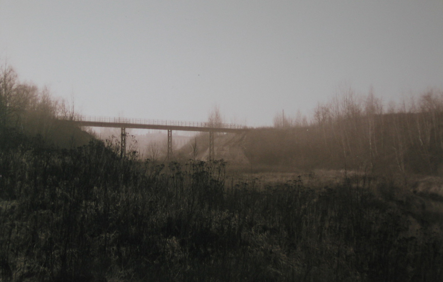 Most na rzece Wildze, tereny poprzemysłowe KZS Solvay.